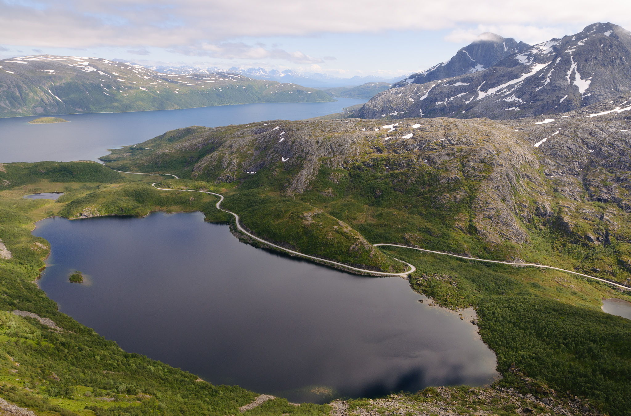 View south from Bruna (near Grøtfjord, Kvaløya, Tromsø, Norway): Storvatnet in the front, Kaldfjorden, Store Blåmannen, and Orvasstinden behind.